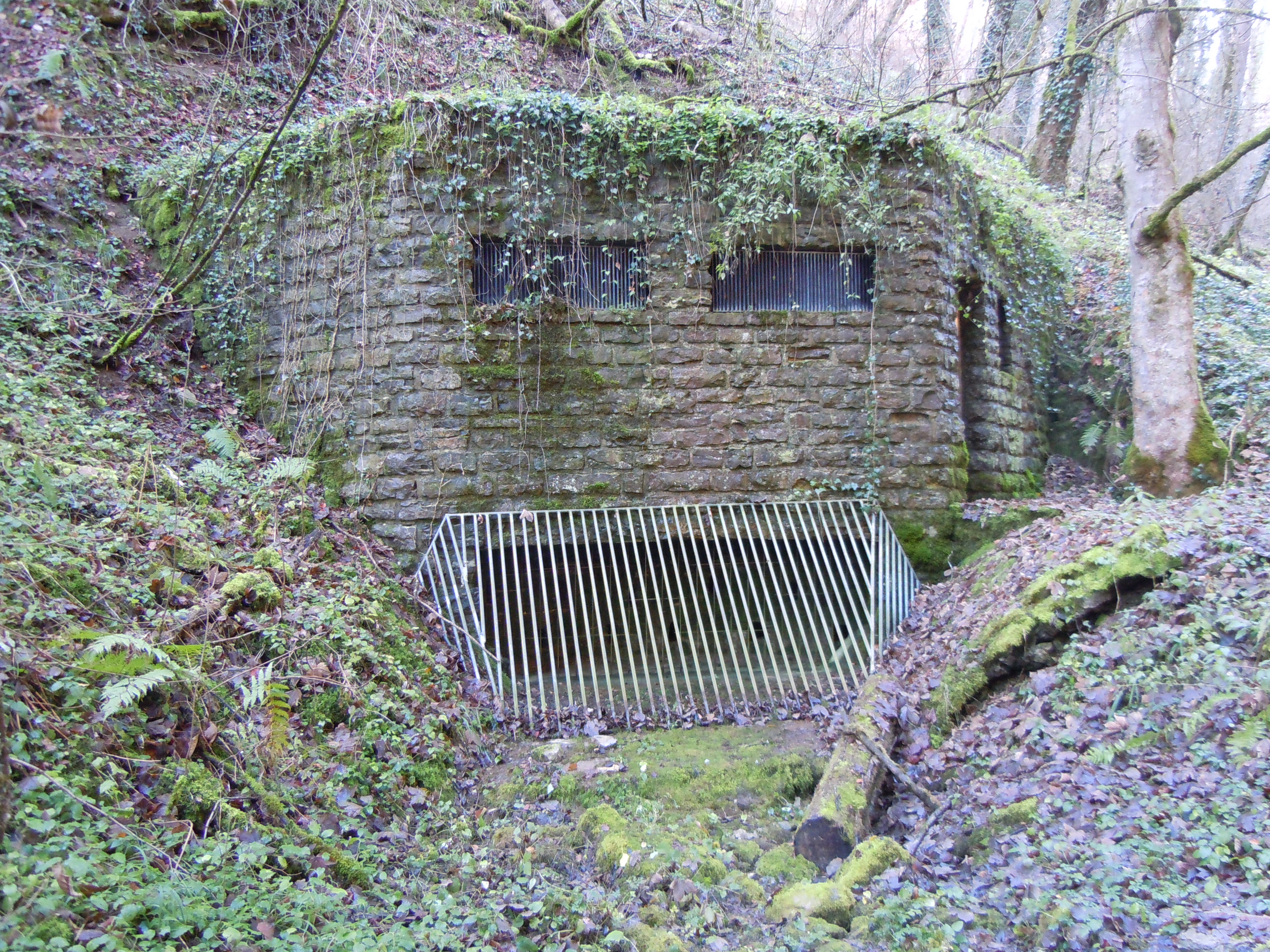 Der Lochbrunnen als Teil des flächenhaften Naturdenkmals "Karstquellen des Talbaches und der Lochbrunnen im Eutinger Tal" (Schutzgebiets-Nr. 82370270015). Der Lochbrunnen wird auch "blaues Wässerle" genannt. Laut Informationstafel am Naturdenkmal musste der Quelltopf des Lochbrunnens zum Schutz vor äußerlicher Wasserverschmutzung mit einem massiven Überbau gedeckelt werden. Als Naturwerkstein wurde der Trochitenkalk des umgebenden Oberen Muschelkalks verwendet.